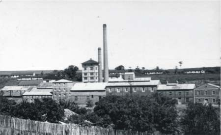 Vista panorâmica da Usina de Cillo, em Santa Bárbara d'Oeste, São Paulo, Brasil.